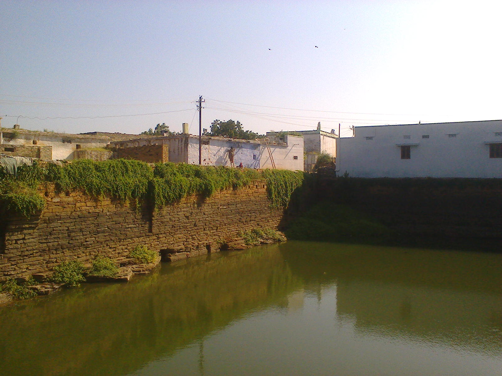 కోనేరు